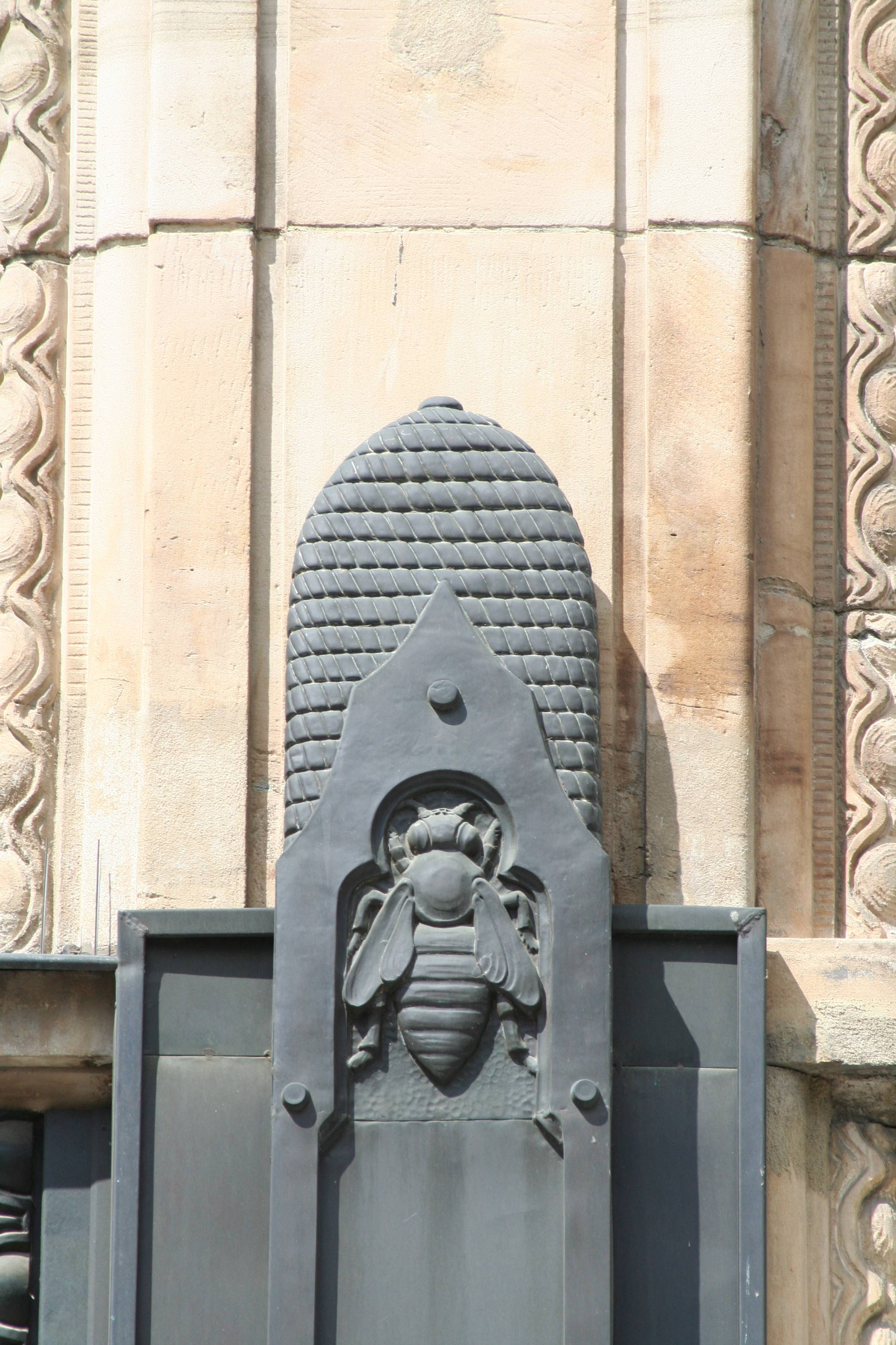 Spitalgasse 19 in Coburg